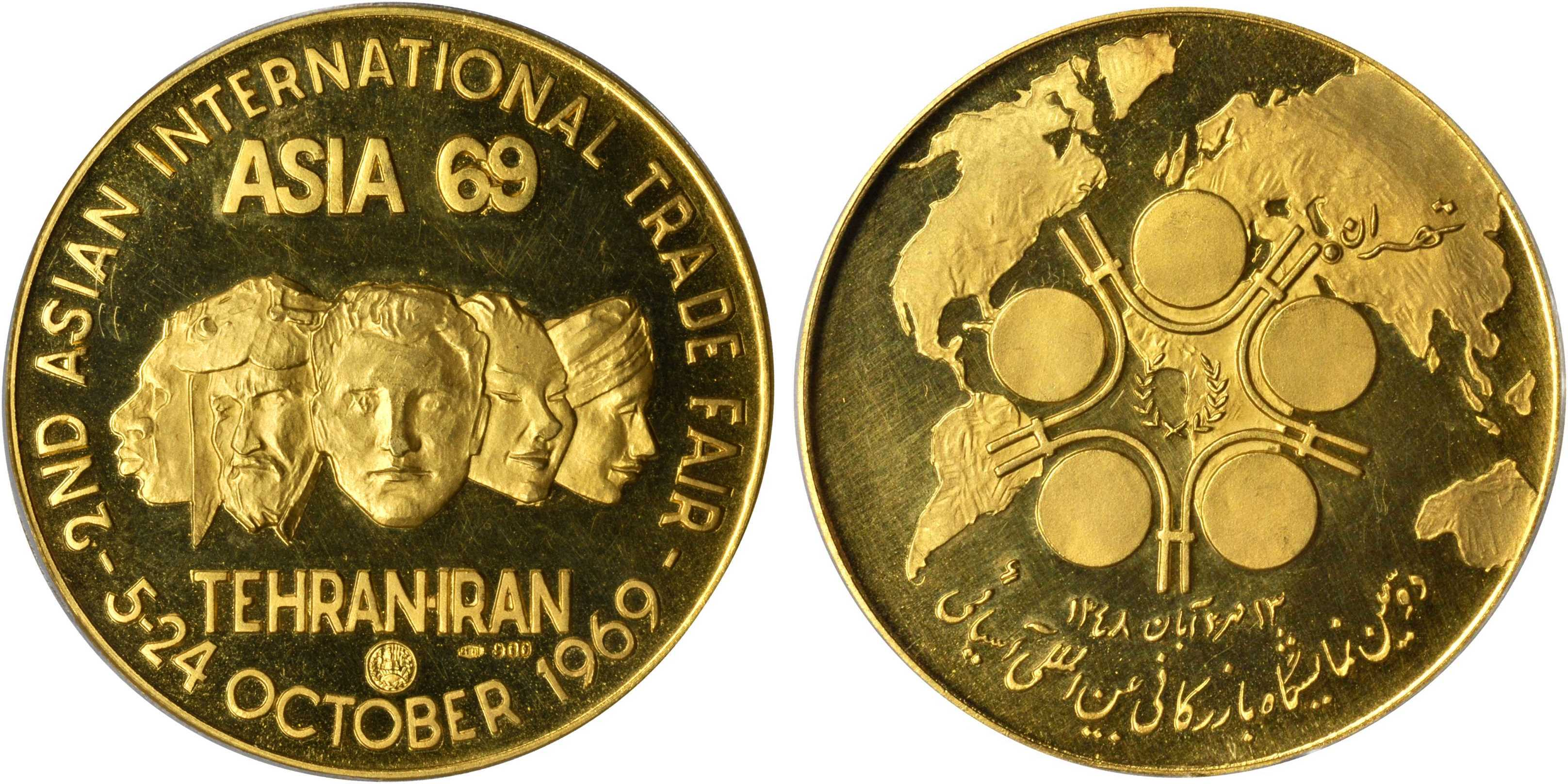 مدال طلای دومین نمایشگاه بازرگانی بین الملل آسیائی